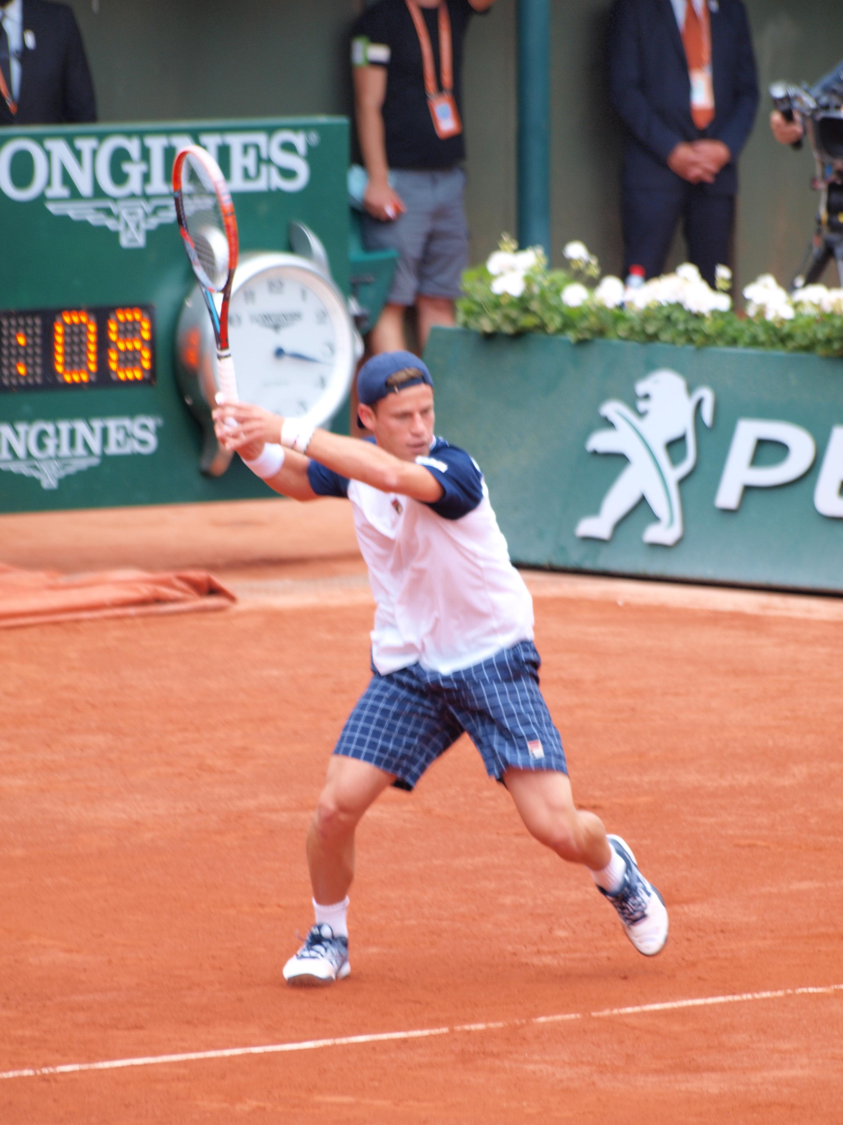 Diego Sebastián Schwartzman , aux Internationaux de tennis de Paris (Stade Roland Garros) , le 2 juin 2017, dans son match contre Novak Djokovic.